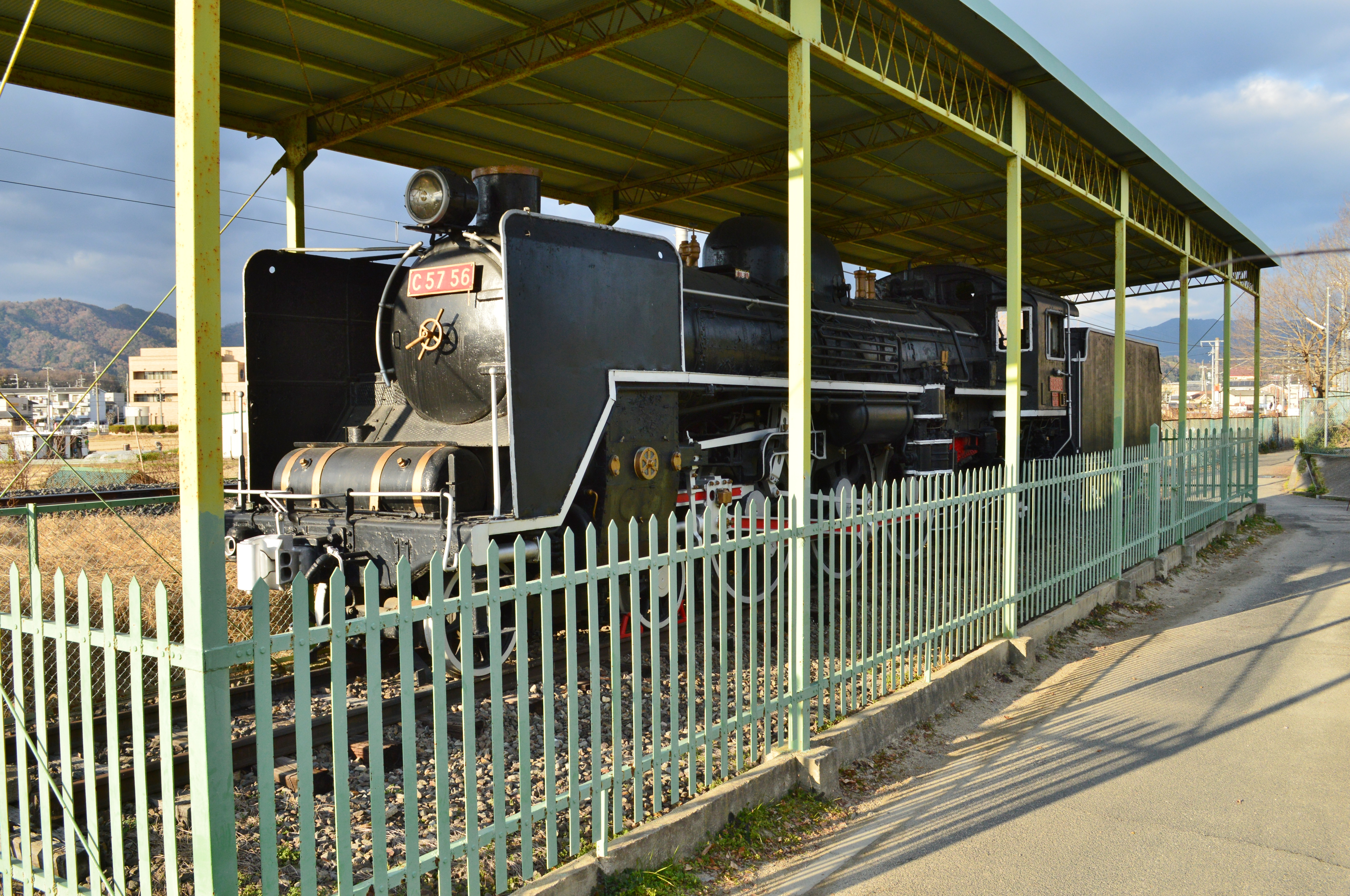 C57 56 (加茂小学校にて)